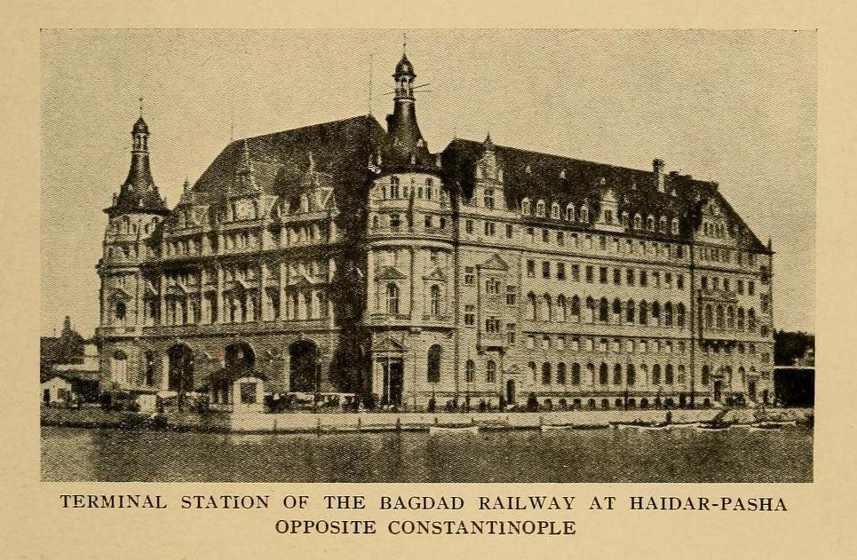 Stazione della Bagdad railway a Haydar Pasha opposite Costantinople